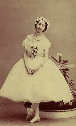 Эмма Леви в главной роли в балете "Сильфида", Париж, 1862